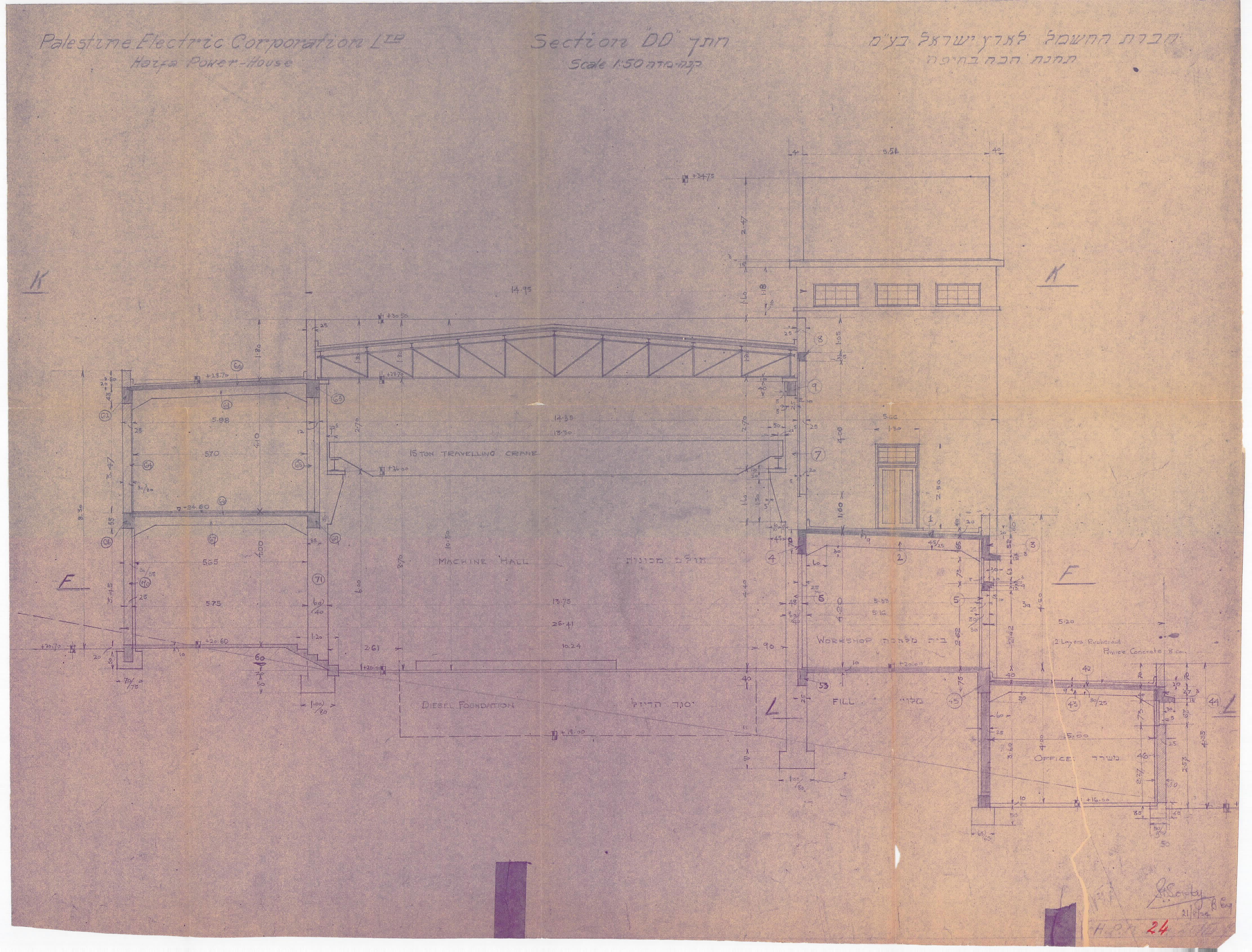 שרטוט חתך תחנת הכוח הראשונה בחיפה